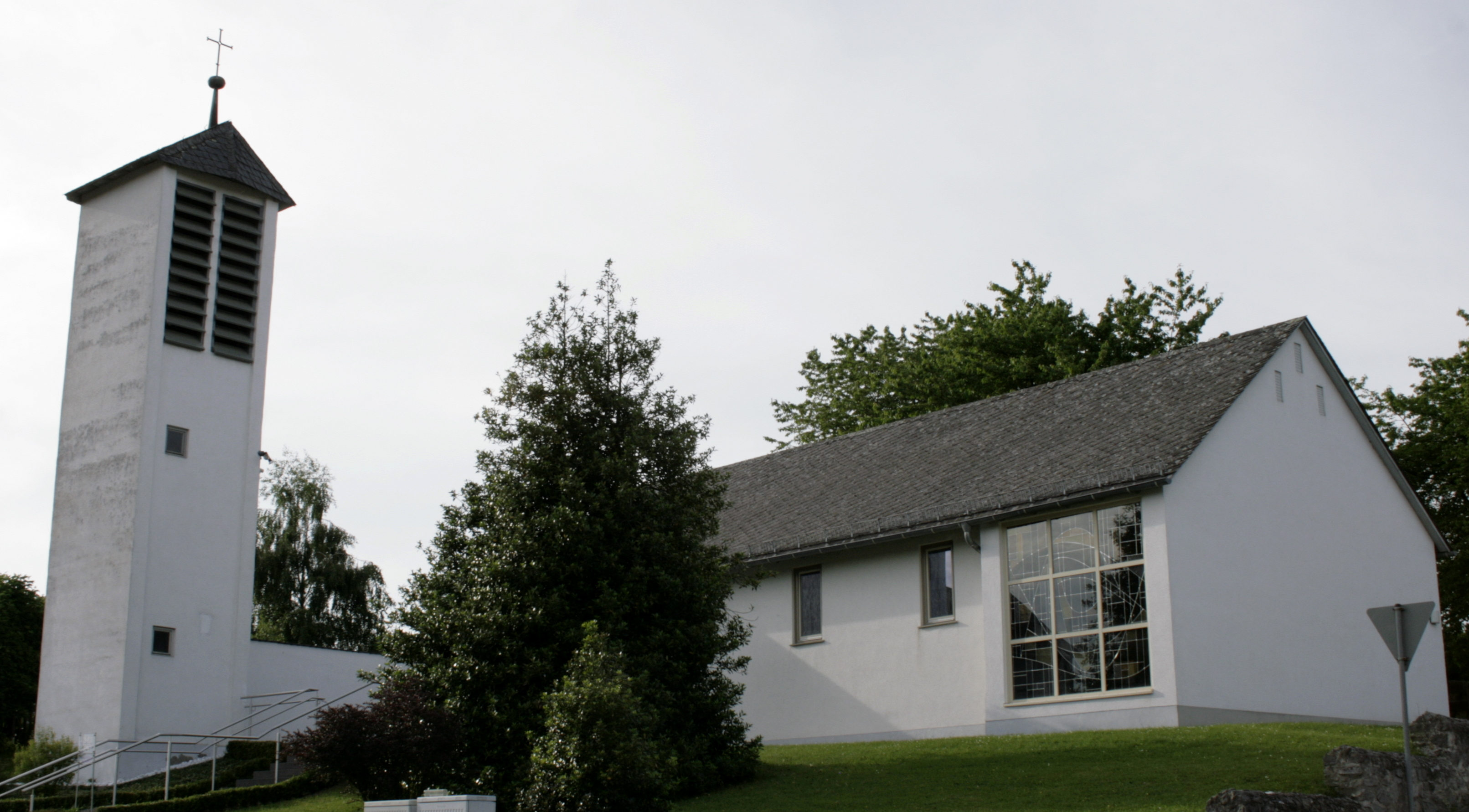 Kirche in Falkenbach, Deutschland